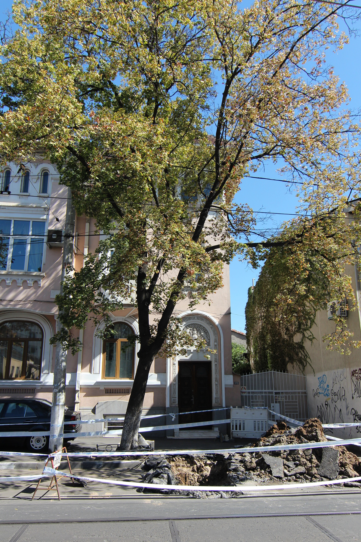 Imobil pe strada Traian